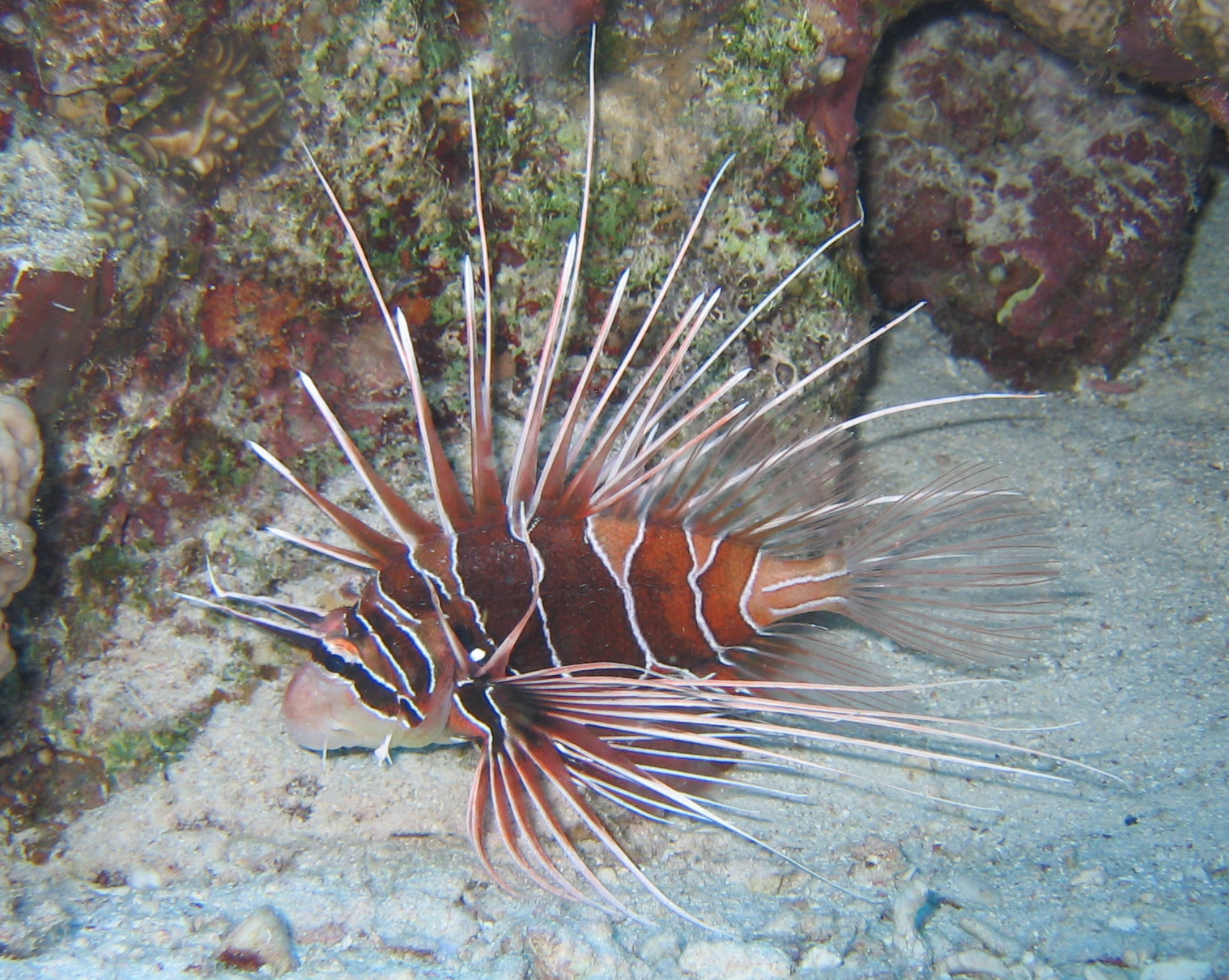 Rascasse volante rayonnée, Egypte 2006, A. Laydier